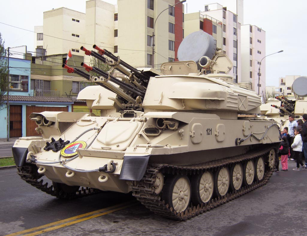 Artillería antiaérea Shilka en la Parada Militar 2011